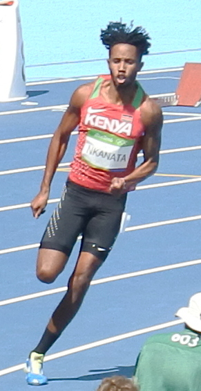 Rio 2016 - Eliminatórias 200m Masculino